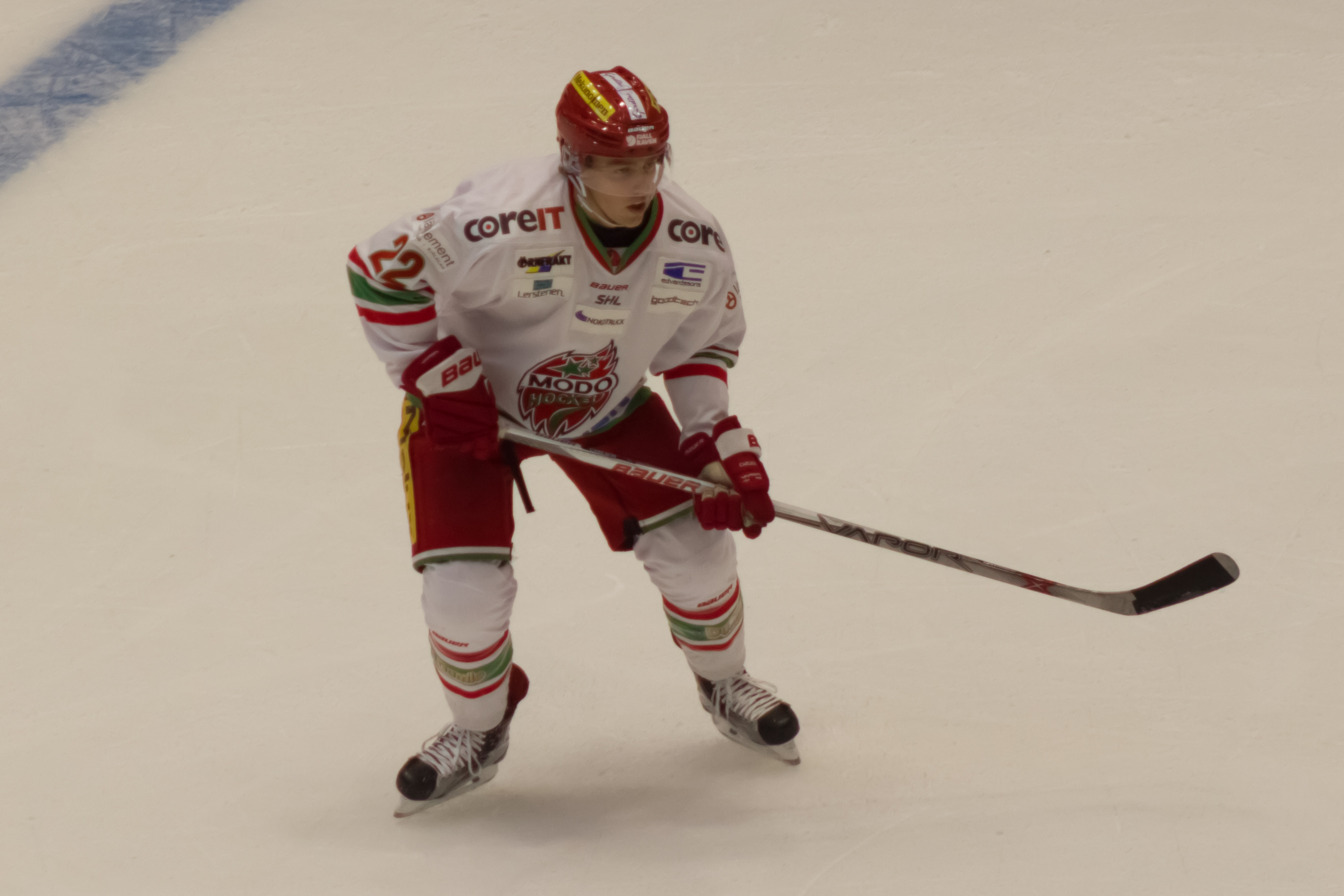 Albin Carlson, xogador do MODO Hockey, nun partido contra o Färjestads BK no Löfbergs Arena de Karlstad.